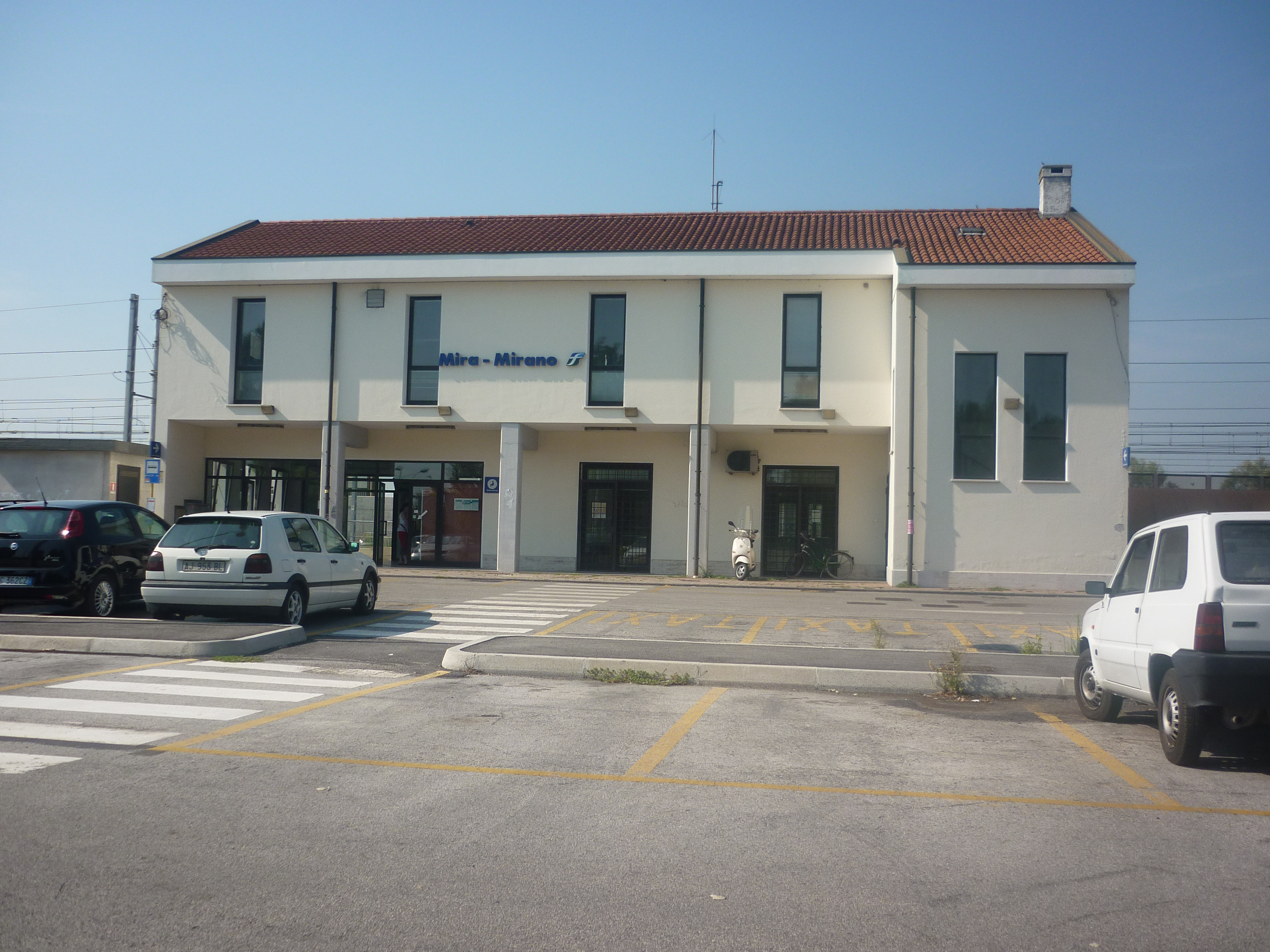 Stazione ferroviaria di Mira-Mirano